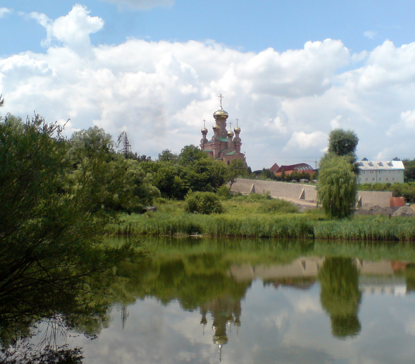 Kiev. Golosiivska Pustyn monastery in Golosiivsky forest.